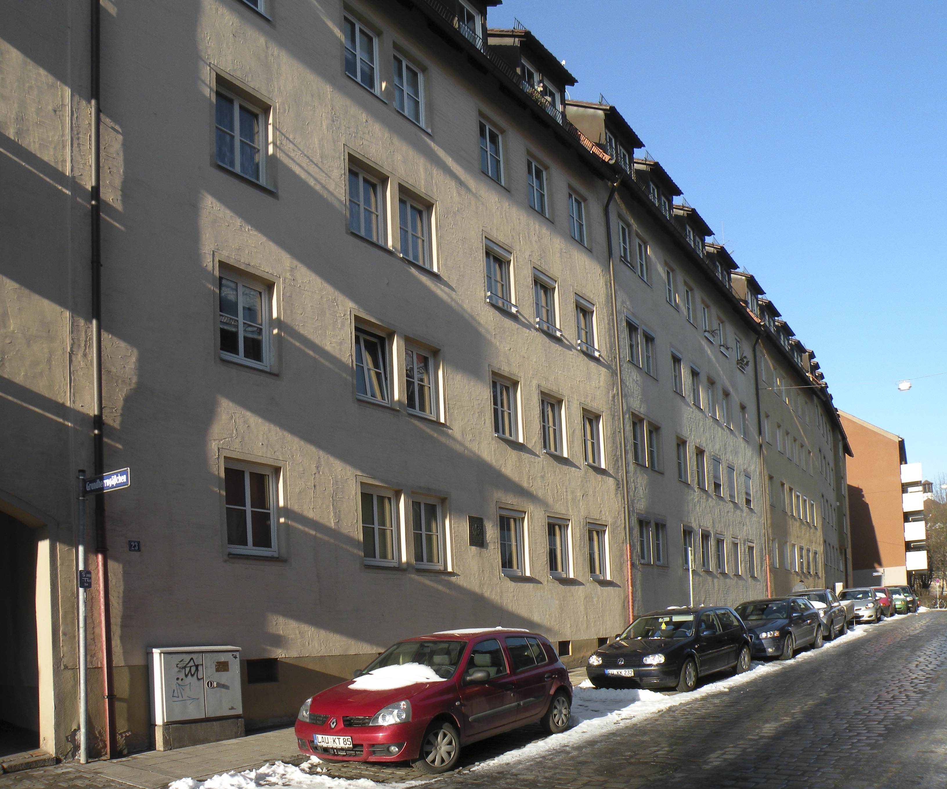 Nürnberg-St. Sebald, Schildgasse gegen Osten mit den Häusern Nr. 23-29.